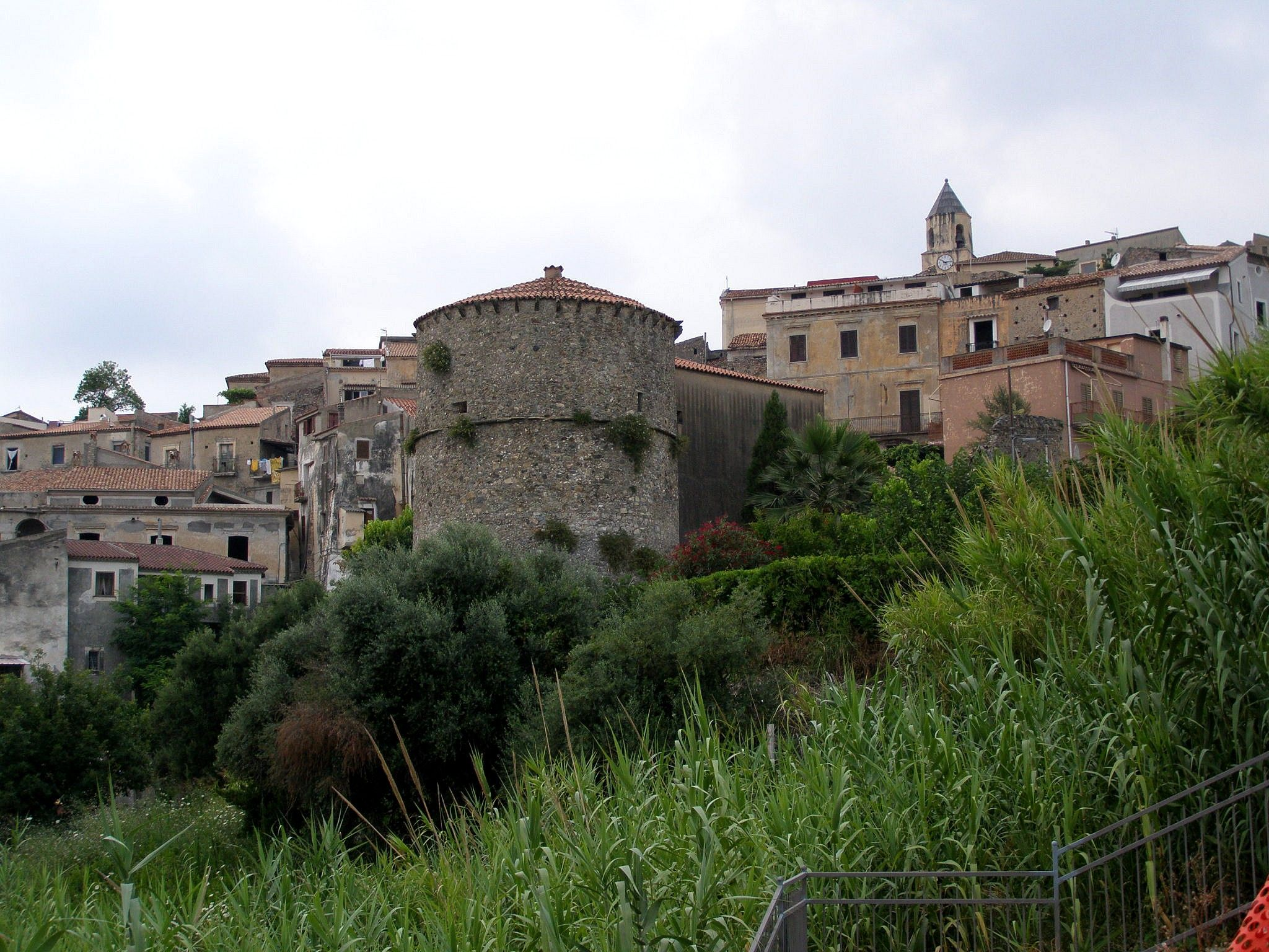 Celkový pohľad na staré mesto